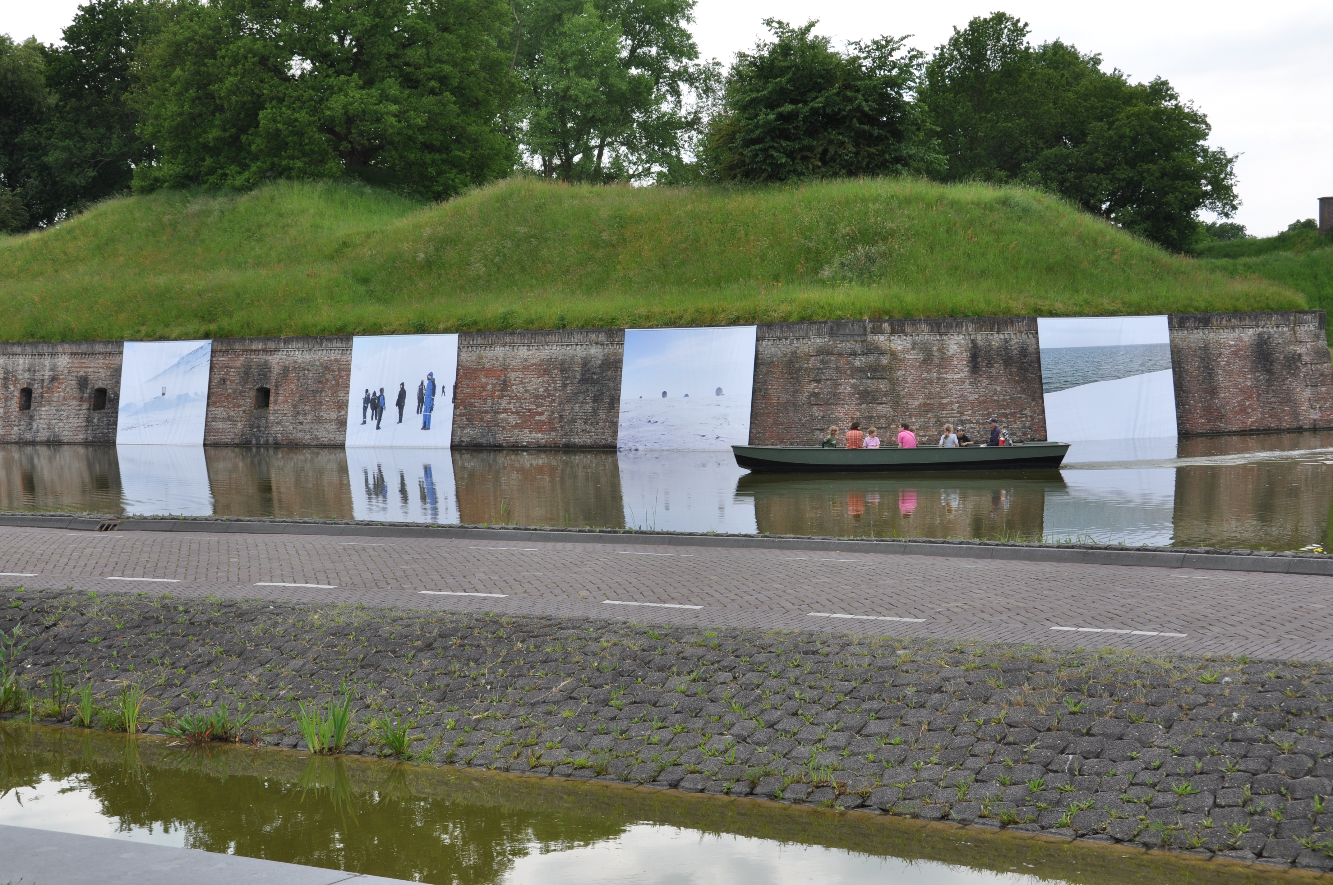 Enkele foto's van het fotofestival Naarden en een fluisterboot bij Naarden vesting.